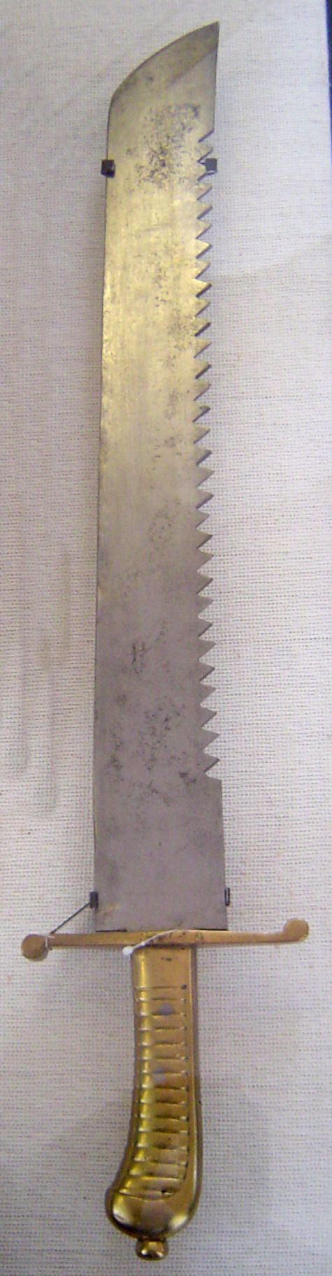 Preußisches gezackstes Faschinenmesser von 1810